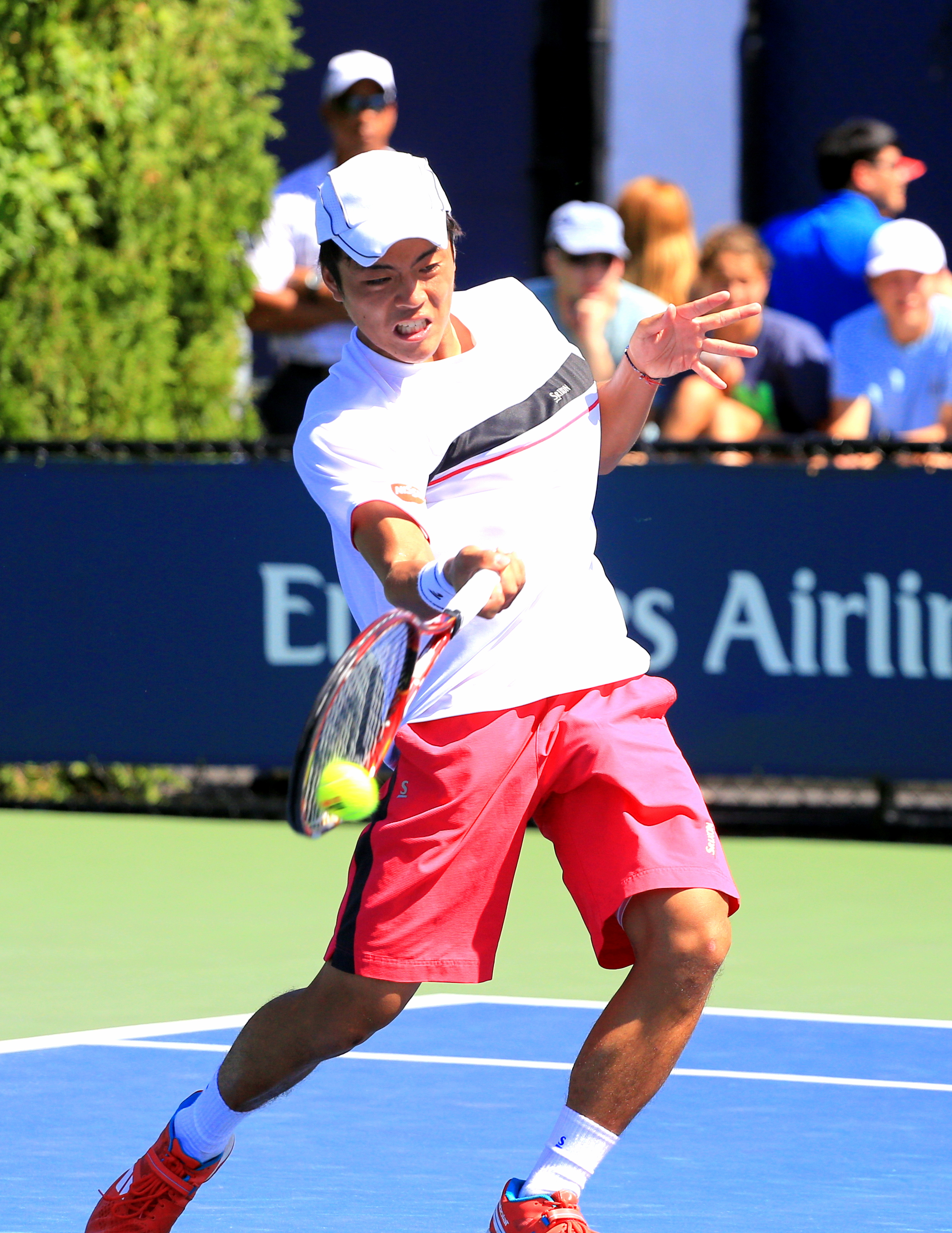 Yusuke Takahashi at the 2015 US Junior Open